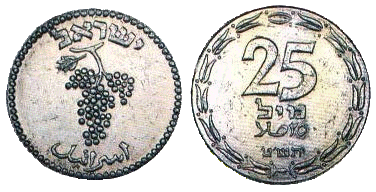 Первая монета государства Израиль достоинством в 25 милль